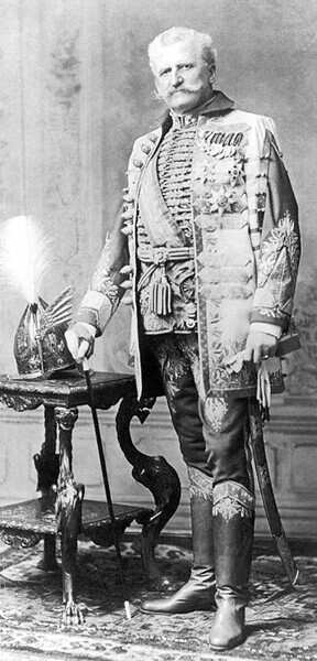 Fejérváry Géza miniszterelnök portréja. Koller Károly utódai fényképfelvétele